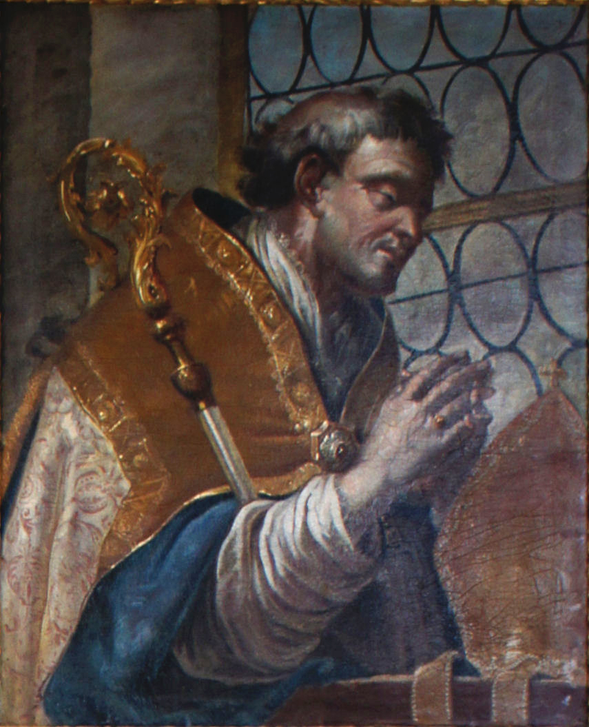 Porträtgemälde von Konrad II. Wildgraf von Dhaun, Bischof von Freising, im Fürstengang zwischen Fürstbischöflicher Residenz und Freisinger Dom.